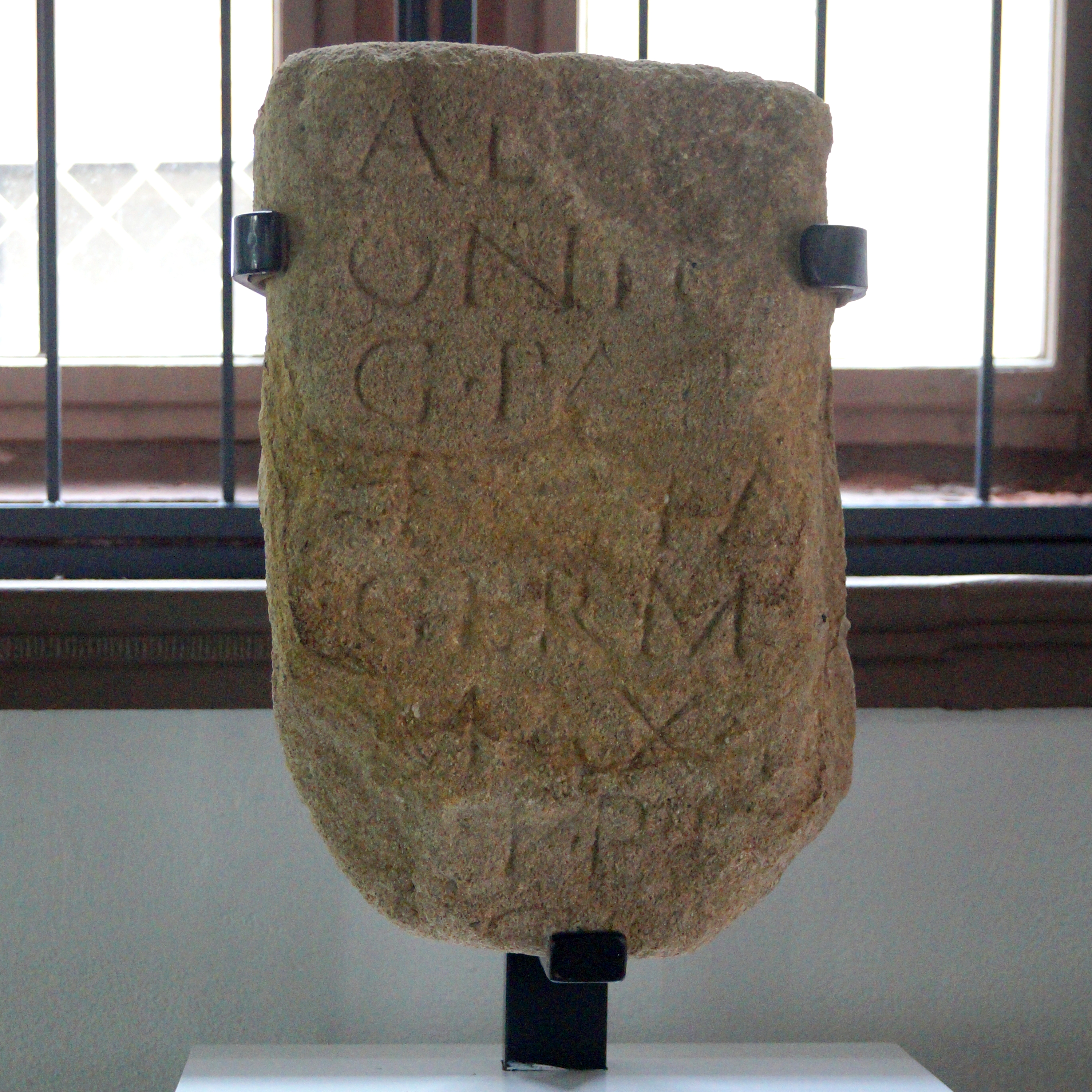 Fragment einer Ehreninschrift für Caracalla und Iulia Mamaea. Fundort: Echzell, Wetteraukreis in Hessen, Ausstellung im Heuson-Museum Büdingen. Literatur: Herbert Nesselhauf/Hans Lieb: Dritter Nachtrag zu CIL XIII: Inschriften aus den germanischen Provinzen und dem Treverergebiet. In: Bericht der Römisch-Germanischen Kommission 40, 1959, S. 120–228, Nr. 184.